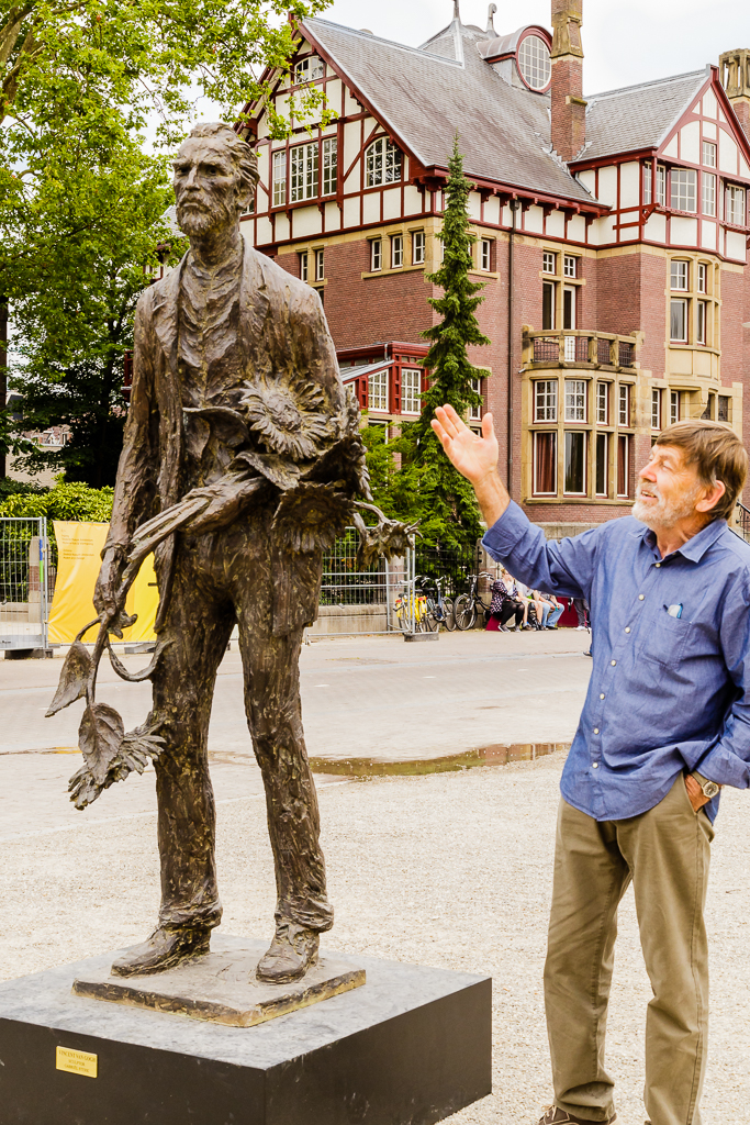 Gabriël Sterk vertelt het verhaal over zijn beeld. De hoek waaronder deze foto is genomen gebeurde op verzoek van Gabriël. Vincent heeft zojuist de zonnebloemen gestolen voor zijn schilderij en is op de vlucht voor de jongeren uit het dorp, argwanend kijkt hij achterom.